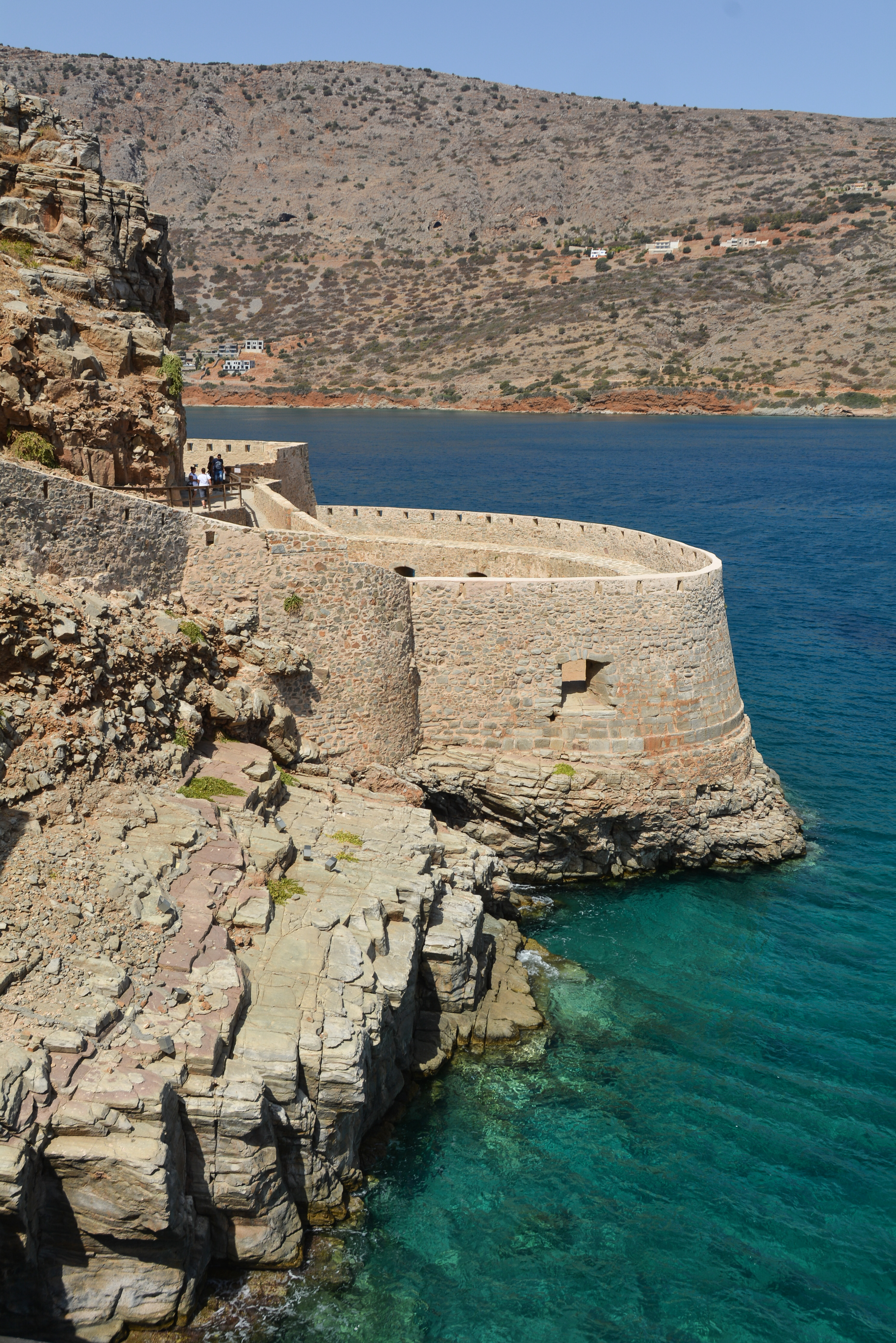 Σπιναλόγκα«Σπιναλόγκα»